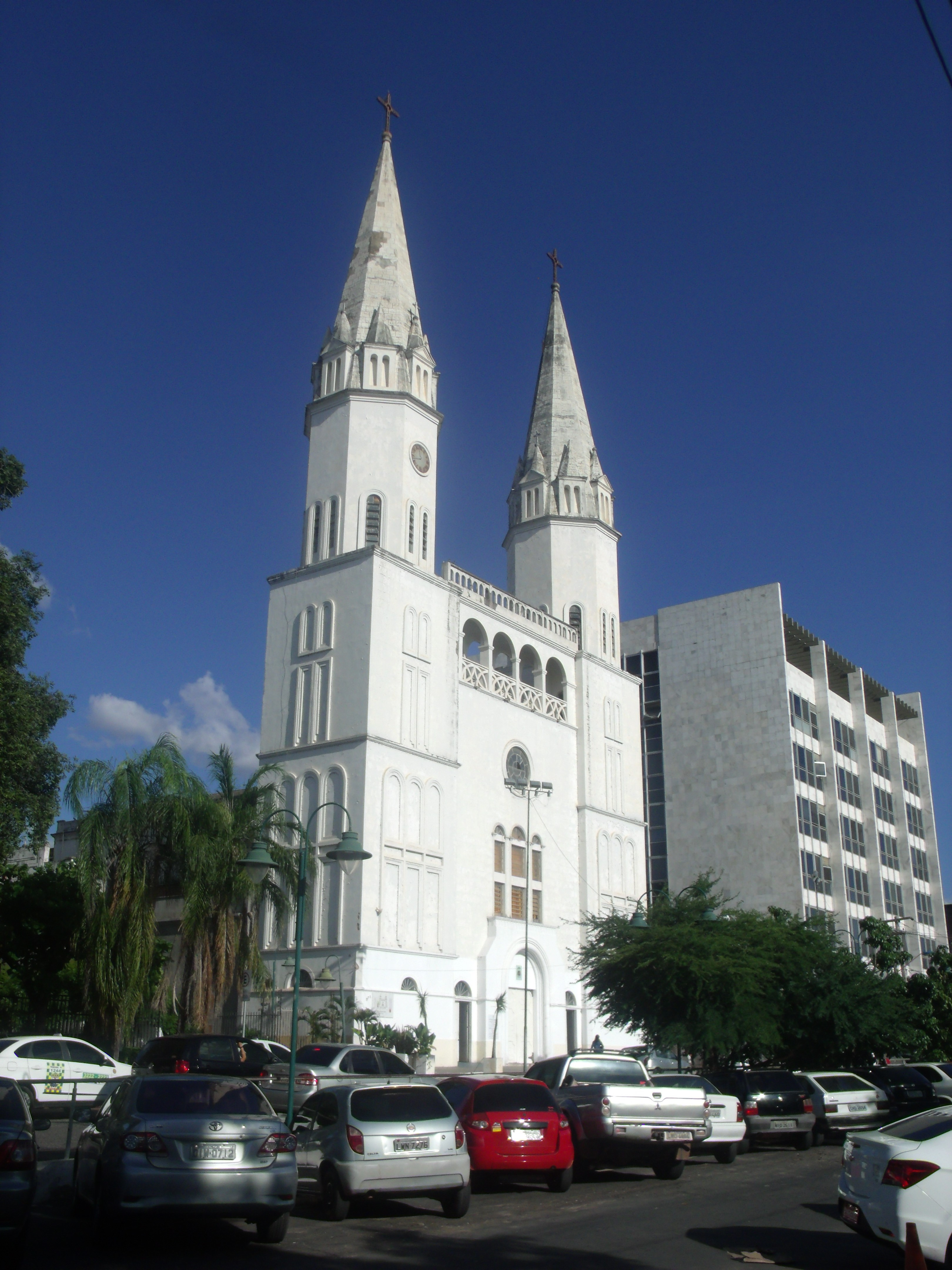 Igreja do Amparo na Praça da Bandeira (Teresina).